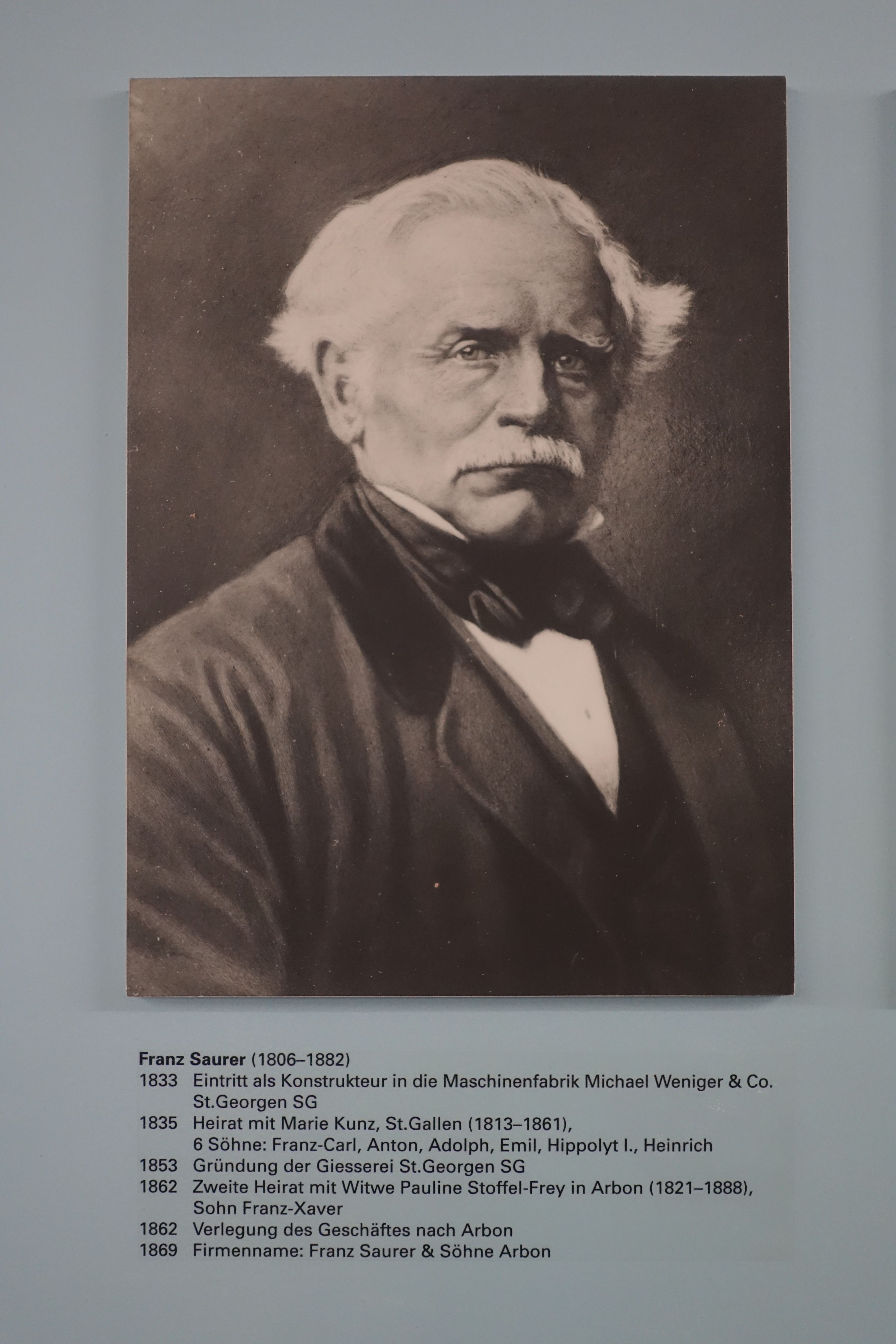 Franz Saurer (1806-1882), gründete 1869 die Firma Franz Saurer & Söhne Arbon, die Vorgängerin der späteren Aktiengesellschaft Adolph Saurer mit Sitz in Arbon (Thurgau)